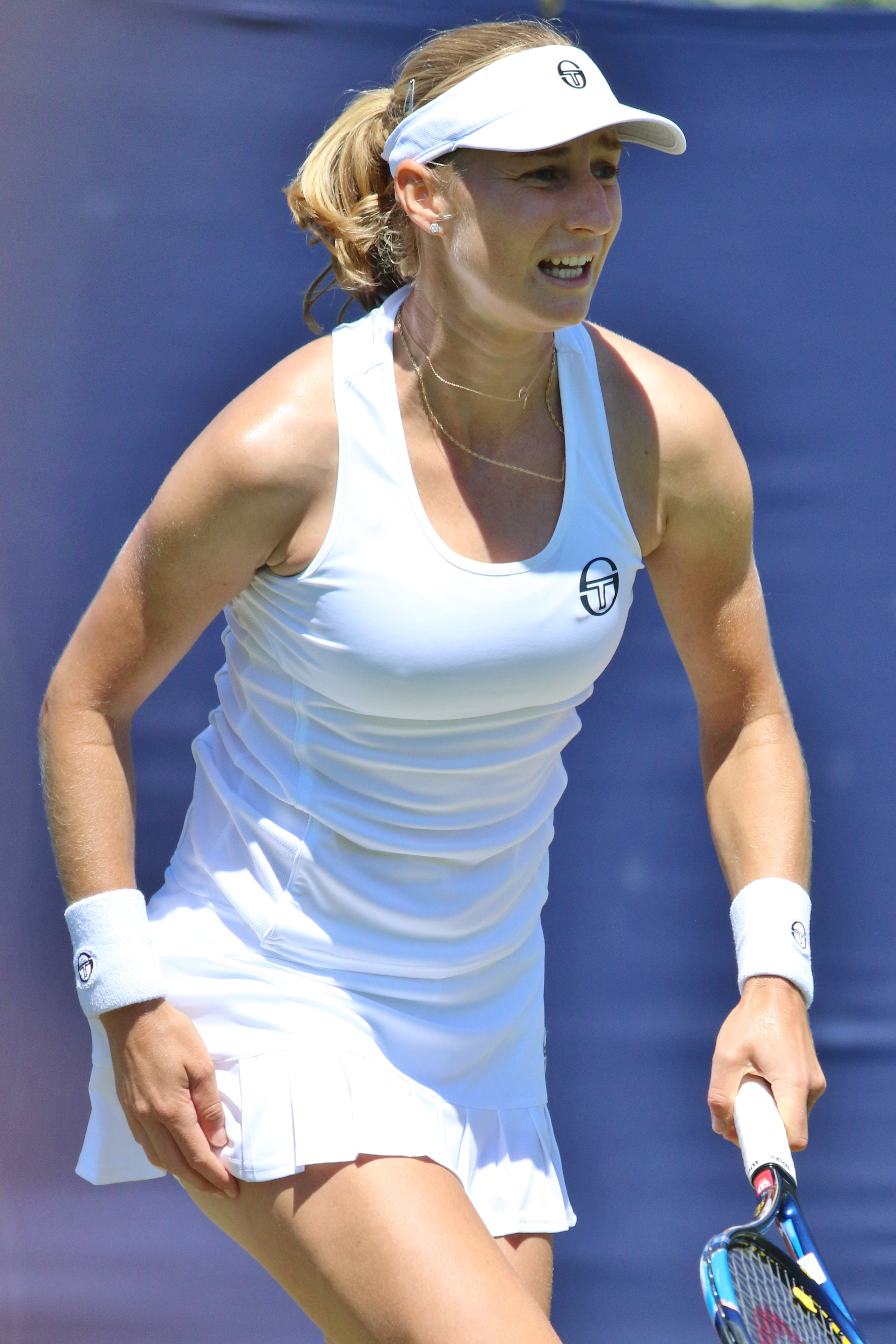 Makarova EBN17 (3)